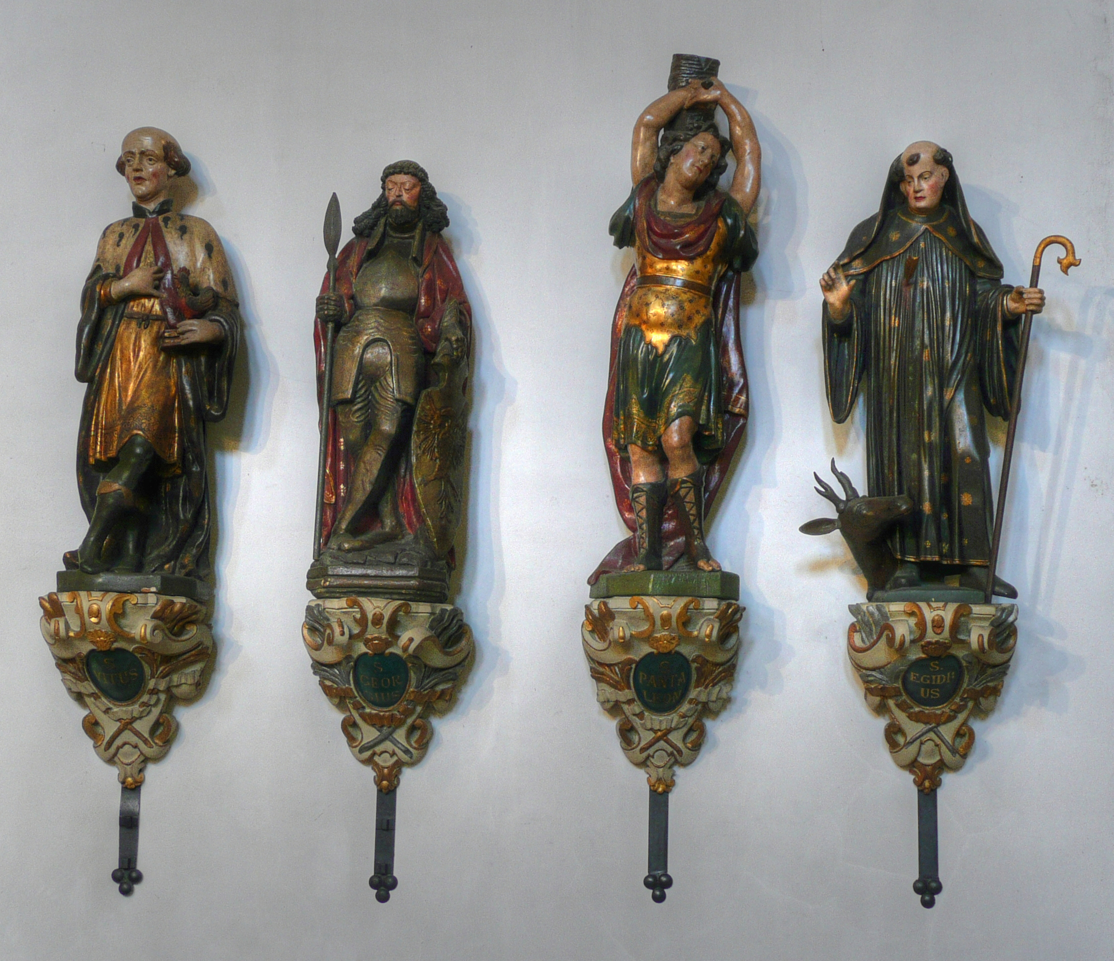 Skulpturen der vier Nothelfer St. Vitus, St. Georg, St. Pantaleon und St. Ägidius in der Kölner Kirche St. Aposteln)